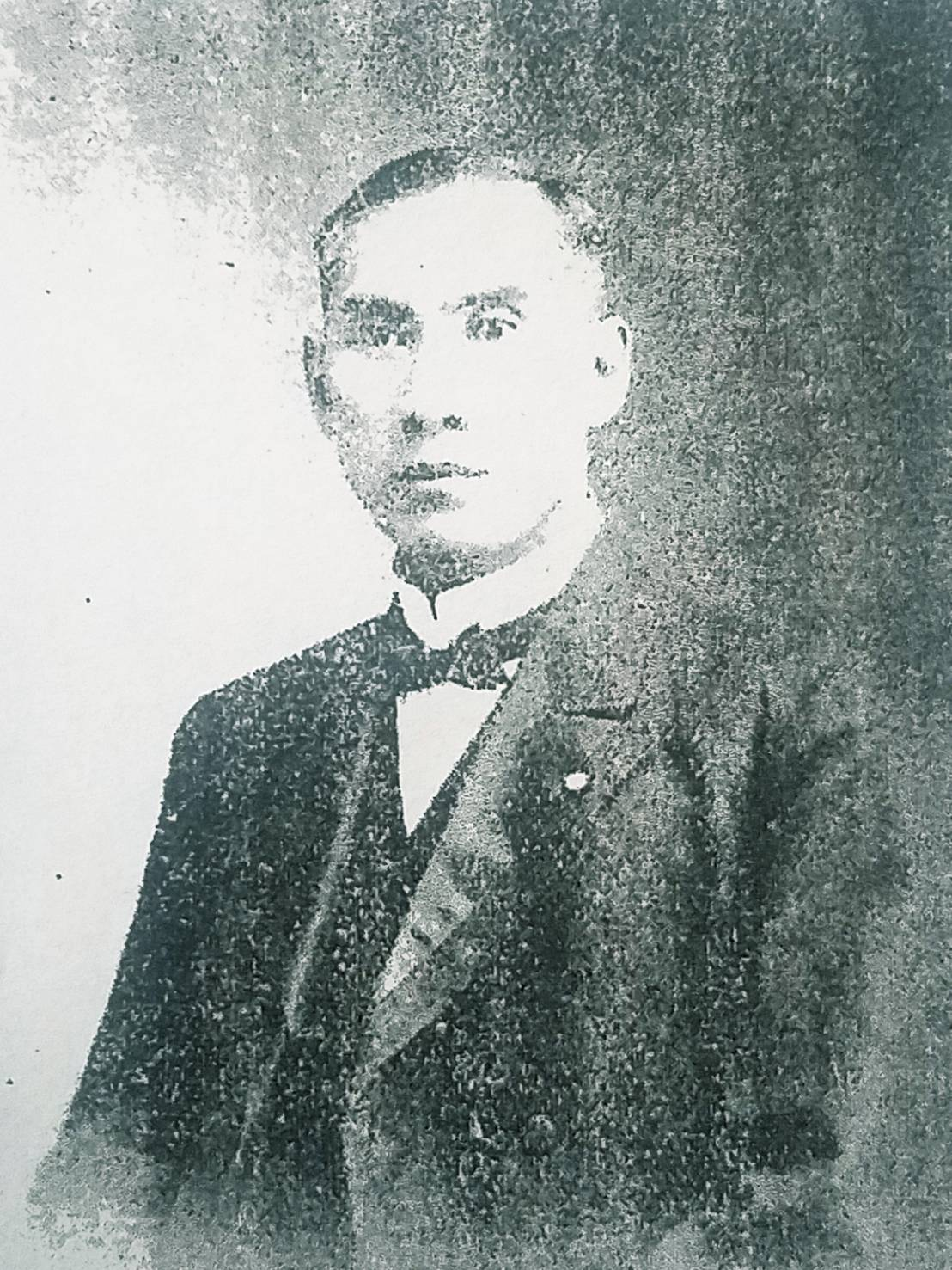 大野順末氏の肖像。大泊町町長時代に撮られた。